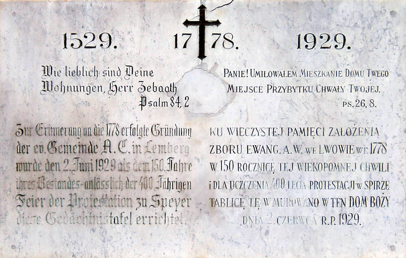 Меморіальна таблиця на колишньому костелі св. Урсули у Львові на вулиці Зеленій.